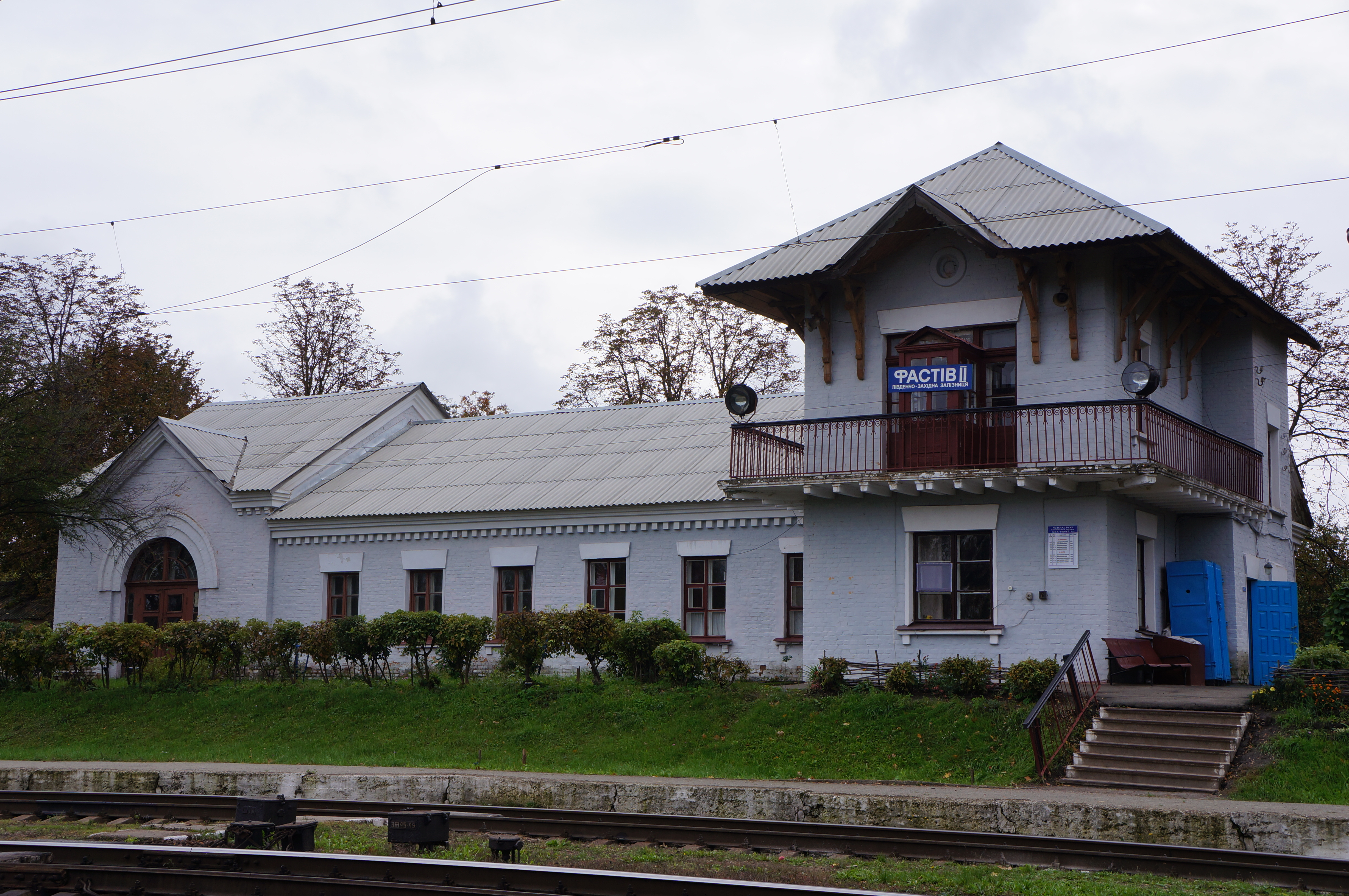 Вокзал